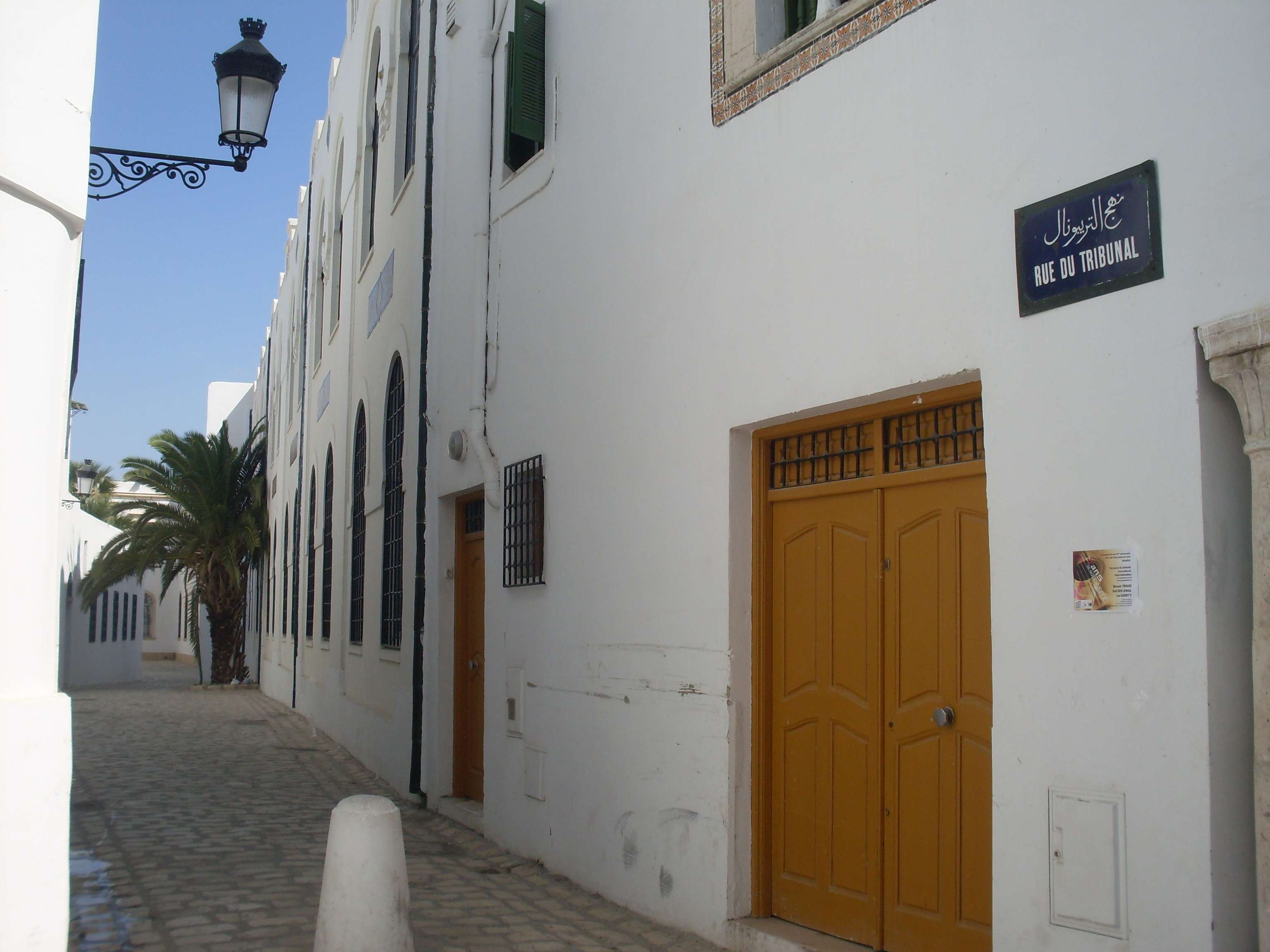 Medina de Tunis, angle rue Tribunal rue Hafsia